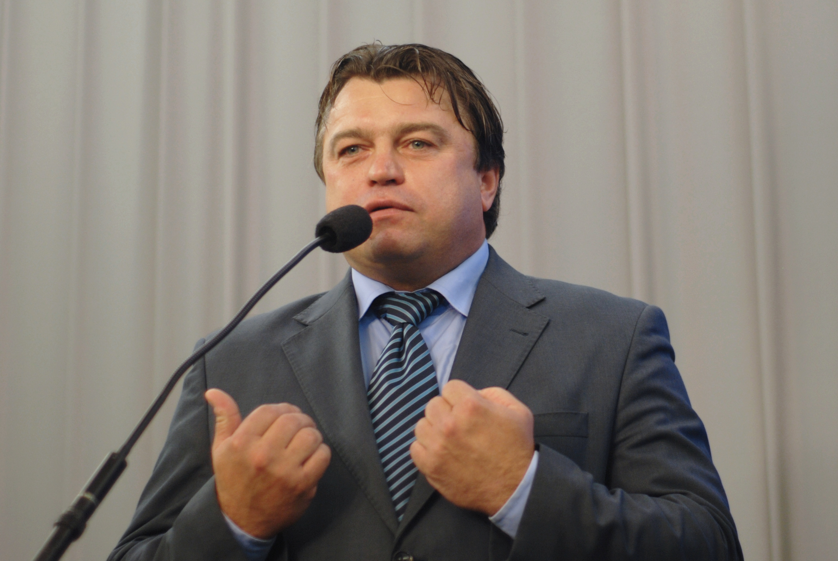 06.10.2011, Druga część konferencji pt. "Stop przemocy na stadionach", w której udział wzięli Rzecznik Klubu Parlamentarnego PO Paweł Olszewski oraz Posłowie Roman Kosecki i Cezary Kucharski